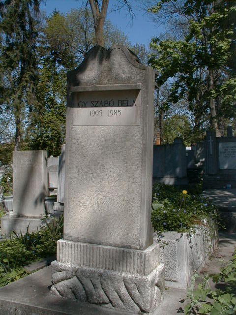 Gy. Szabó Béla sírja Kolozsváron, a Házsongárdi temetőben. 290